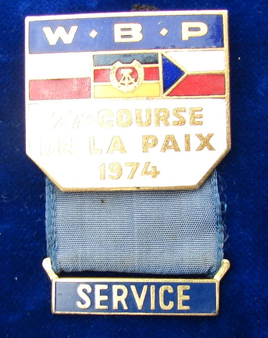 Original Service pin badge W·B·P (Warsaw Berlin Prague) . 3 lines below the East German flag: "27 · COURSE DE LA PAIX 1974". 35 x 30 mm Condition: EXTREMELY FINE+